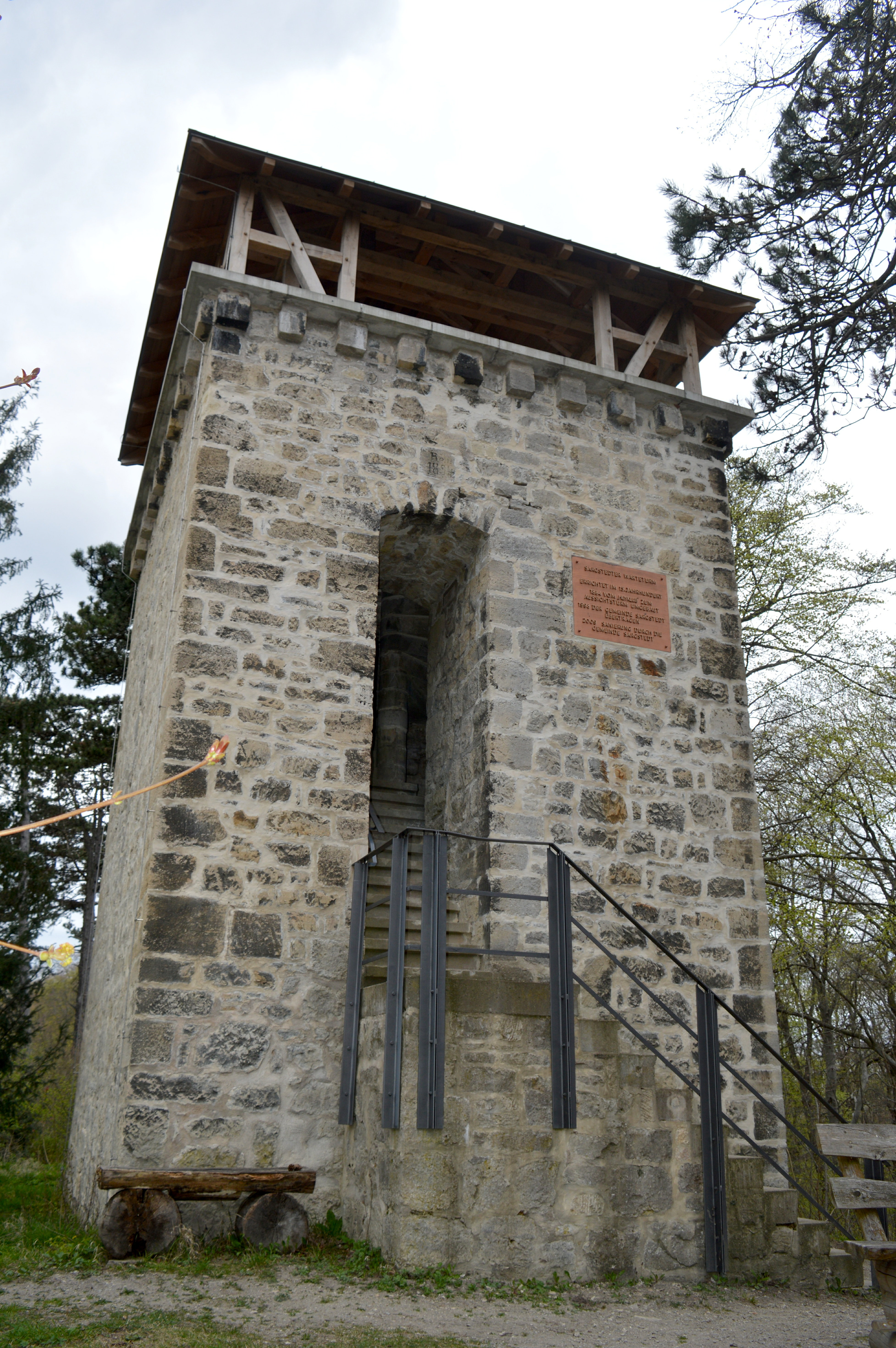 Landschaftsschutzgebiet Huy - Sargstedter Warte (1)